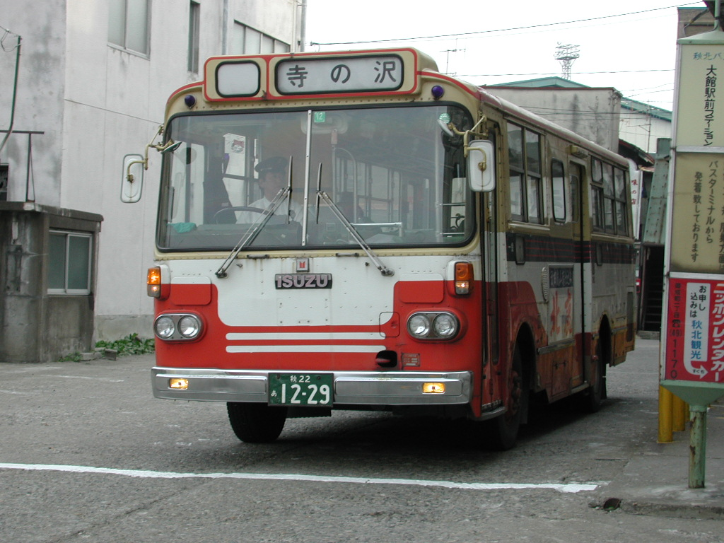 駅前ステーション停車中の秋北バス